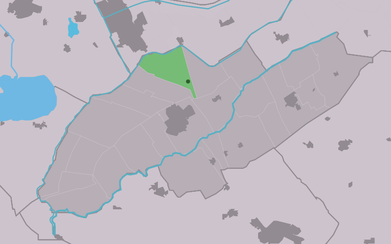 Kaartsje fan himrik fan Aldeholtwâlde